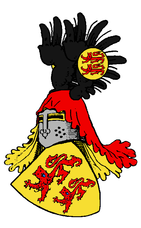 Stammwappen der Grafen von Weilnau.